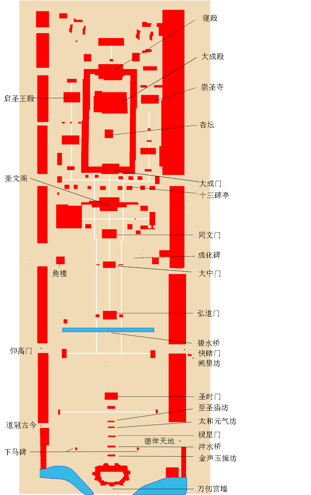 中文（中国大陆）: 中国山东省曲阜市孔庙地图